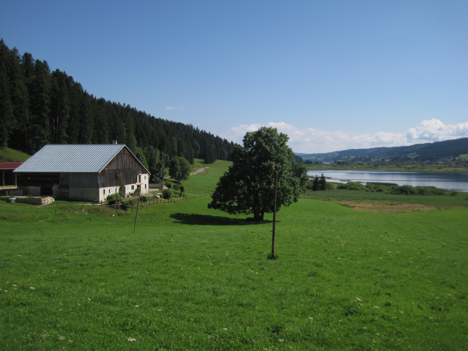 Ferme comtoise